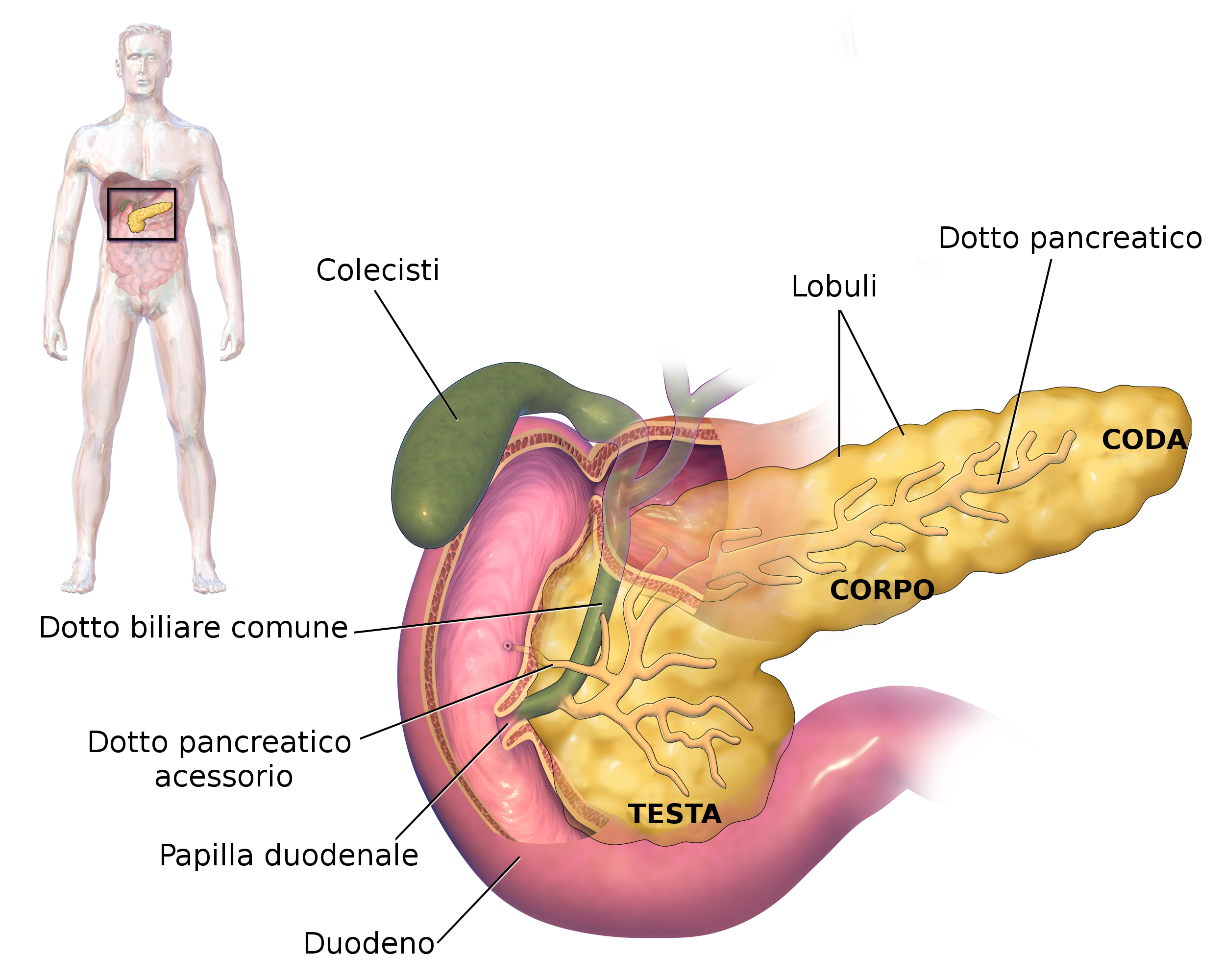 Anatomia del pancreas